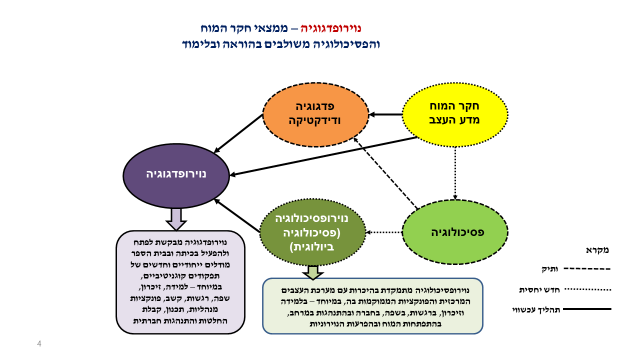 גרף נוירופדגוגיה